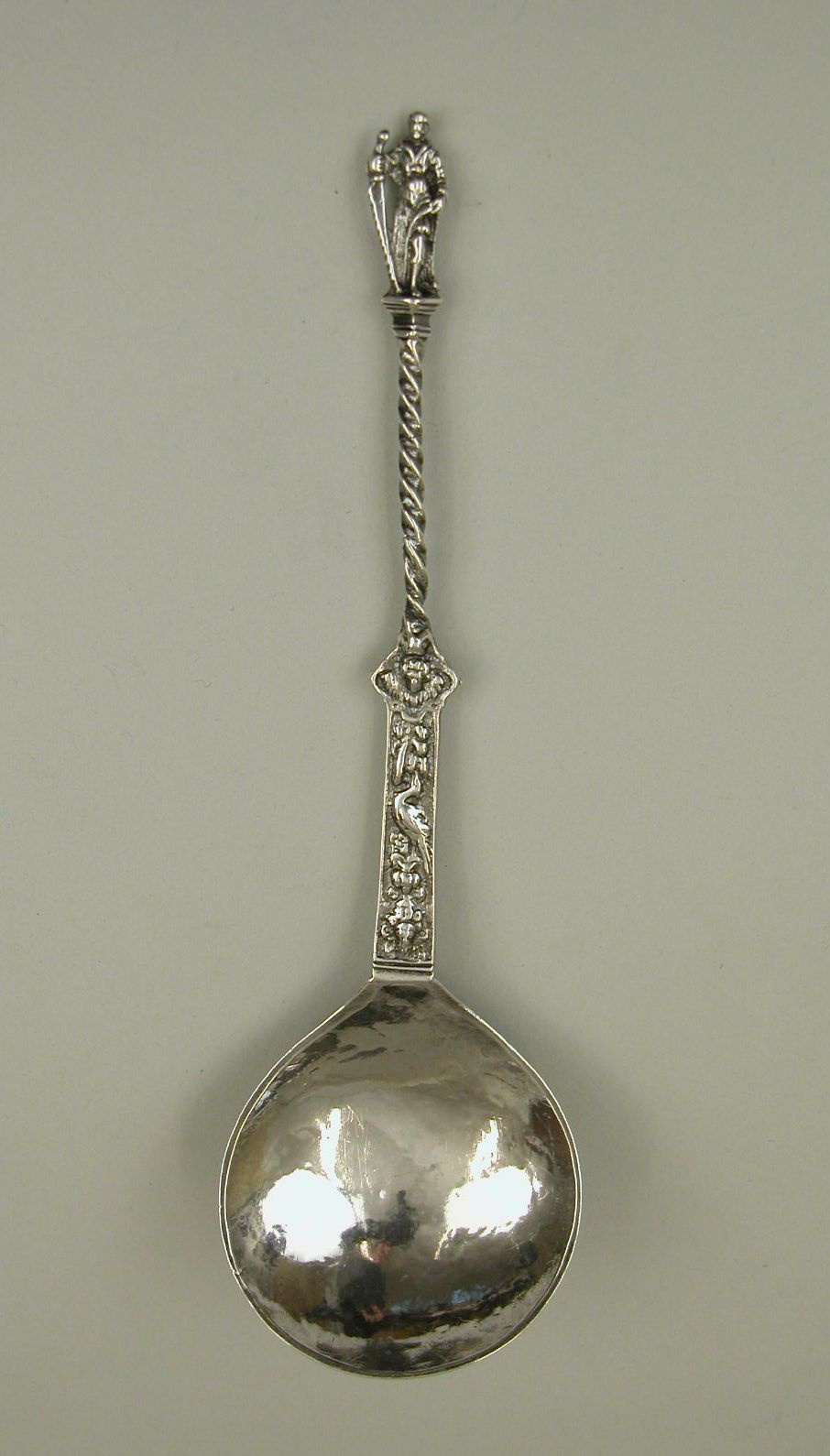 Gelegenheidslepels met voorstelling van Simon 17 e eeuw ABM m1927, ABM m1450, BMH m1980 Ter gelegenheid van geboorte of huwelijk schenken mensen elkaar in de zeventiende eeuw zilveren lepels, al dan niet versierd met religieuze voorstellingen. De lepels werden slechts een enkele maal gebruikt, bijvoorbeeld voor het scheppen van brandewijn om te toosten op het pas gehuwde paar of de jonggeborene. Deze lepels zijn versierd met een voorstelling van de apostel Simon. De apostel stierf een marteldood: hij werd doormidden gezaagd.